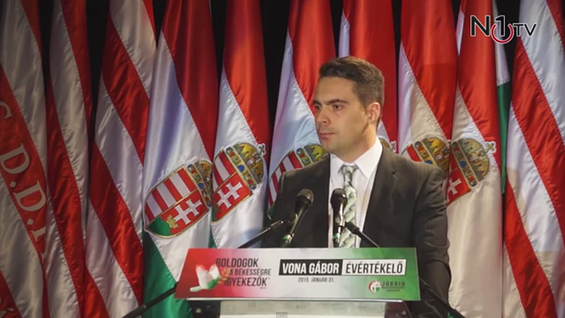 Vona Gábor évértékelő beszédje, 2015. január 31.